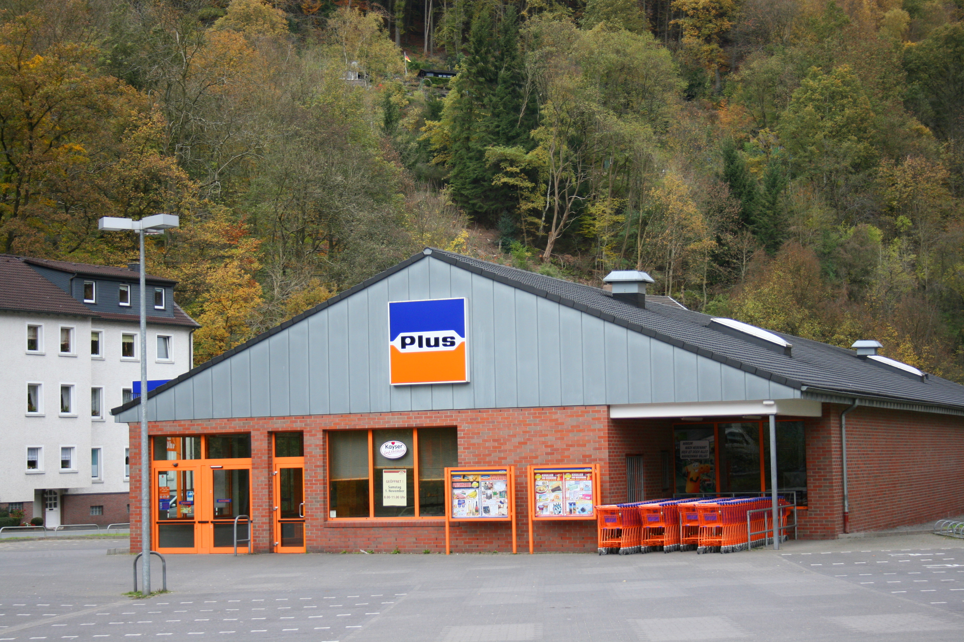 Rahmedestraße in Altena